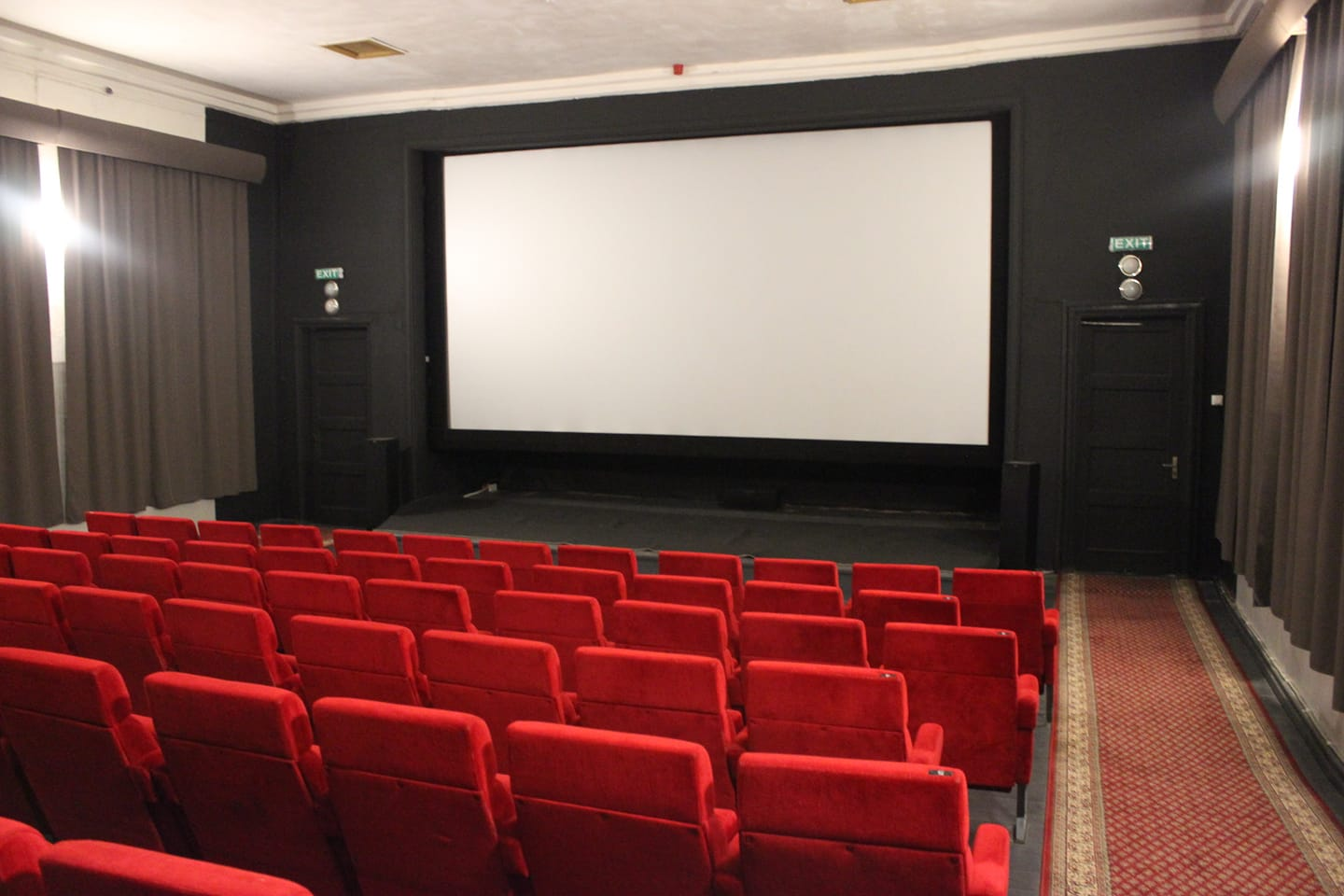 Vaade saali tagant 2019. aasta kevadel pärast renoveerimist.